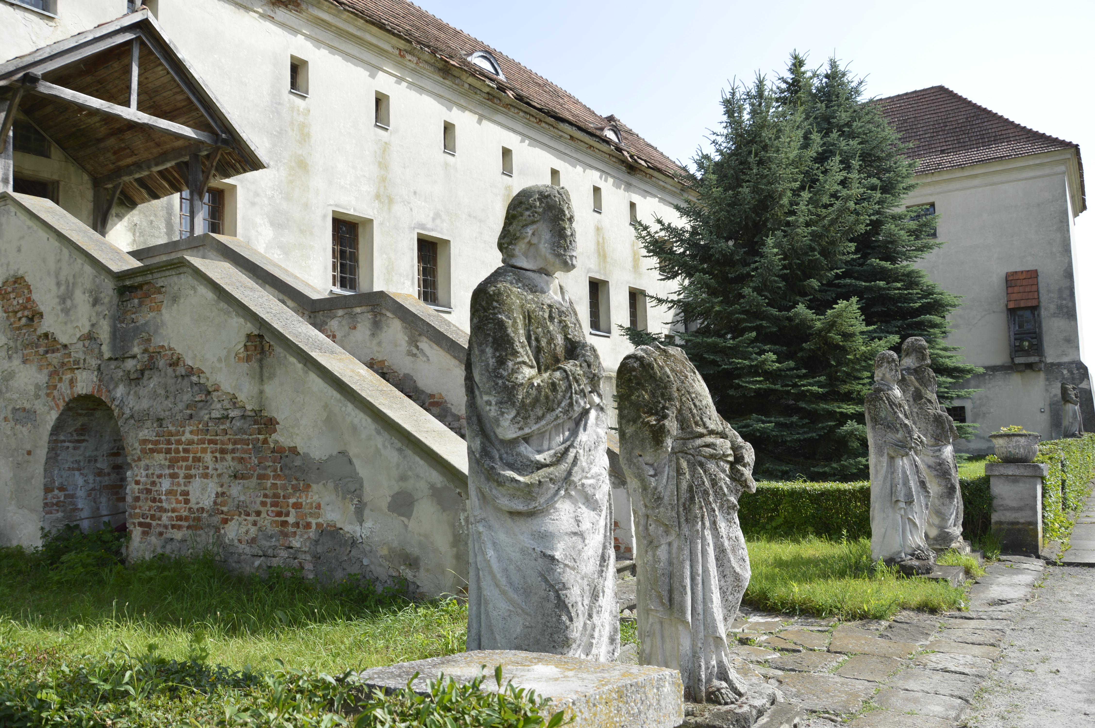 Монастир капуцинів, Олесько